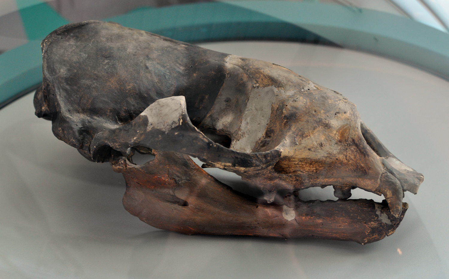 Piscophoca sp.